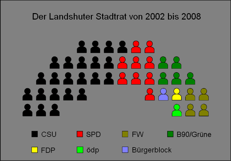 Sitzverteilung des Landshuter Stadtrats von 2002 bis 2008